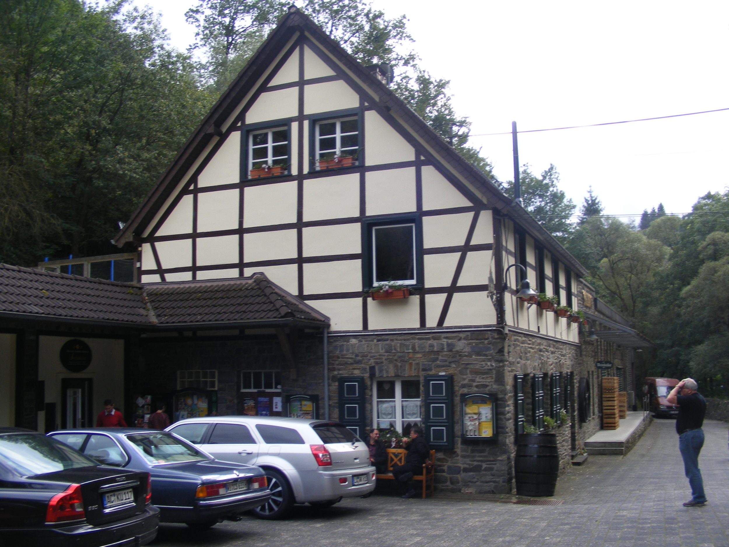 Monschau Laufenstraße 116 - 124 Gebäude 1This is a photograph of an architectural monument., no. 241